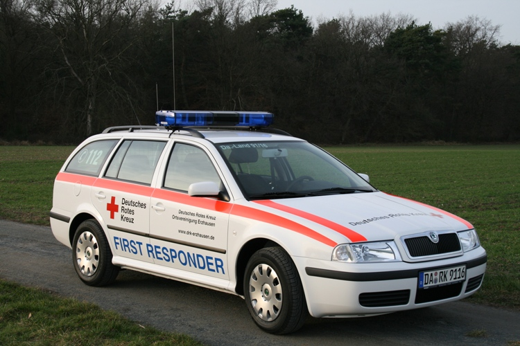 First Responder Fahrzeug des Deutschen Roten Kreuzes Erzhausen; Landkreis Darmstadt-Dieburg Bei dem Fahrzeug handelt es sich um einen Skoda Octavia Tour Modellreihe I. Diese Modellreihe wird aufgrund der hohen Nachfrage immer noch hergestellt, obwohl bereits der Octavia II auf dem Markt ist. Als Signalanlage wurde ein Balken von Elektra verbaut, die Beklebung stammt von der Fa. Wagner-Projekte aus Gießen und entspricht weitestgehend dem neuen DRK CI. In die Heckklappe wurden zusätzlich 2 Heckwarnleuchten (HWL) von Hella eingebaut. Zwischen Fahrgastraum und Kofferraum wurde aus Sicherheitsgründen ein Gitter eingebaut, welches bei einem evtl. Unfall vor herumfliegenden Ausrüstungsteilen schützen soll. Das Fahrzeug steht dem diensthabenden First Responder zur Verfügung. Das heißt der PKW steht an keiner Unterkunft, sondern wird von dem jeweiligen First Responder mit nach Hause oder auf die Arbeit genommen. Von dort aus werden dann die Einsätze gefahren. Alarmierung erfolgt von durch die Leitfunkstelle Darmstadt über Funkmeldeempfänger. Der Auftrag wird dann über Funk durchgegeben. Der Einsatzauftrag wird zusätzlich von der Leitfunkstelle Darmstadt per Push-Mail auf ein Blackberry geschickt. Zur Ausrüstung gehören: - Notfallrucksack, annähernd DIN 13232 - Kindertasche DIN 13233 - AED FR2+ mit EKG - 2l Sauerstoffflasche - 2 Decken - 2 Helme - 4 Warnwesten - Brecheisen - Bolzenschneider - Feuerwehrbeil - Pfostenschlüssel - Feuerlöscher - LED MagLite - Kartenmaterial - div. Ersatzmaterial - CO-Warner "CO Single Gas Clip 24 Month Monoxide Gas Detector - von Single Gas Technologies, Midlothian Texas USA" Bei Sanitätsdiensten wird das Fahrzeug als NEF benutzt.